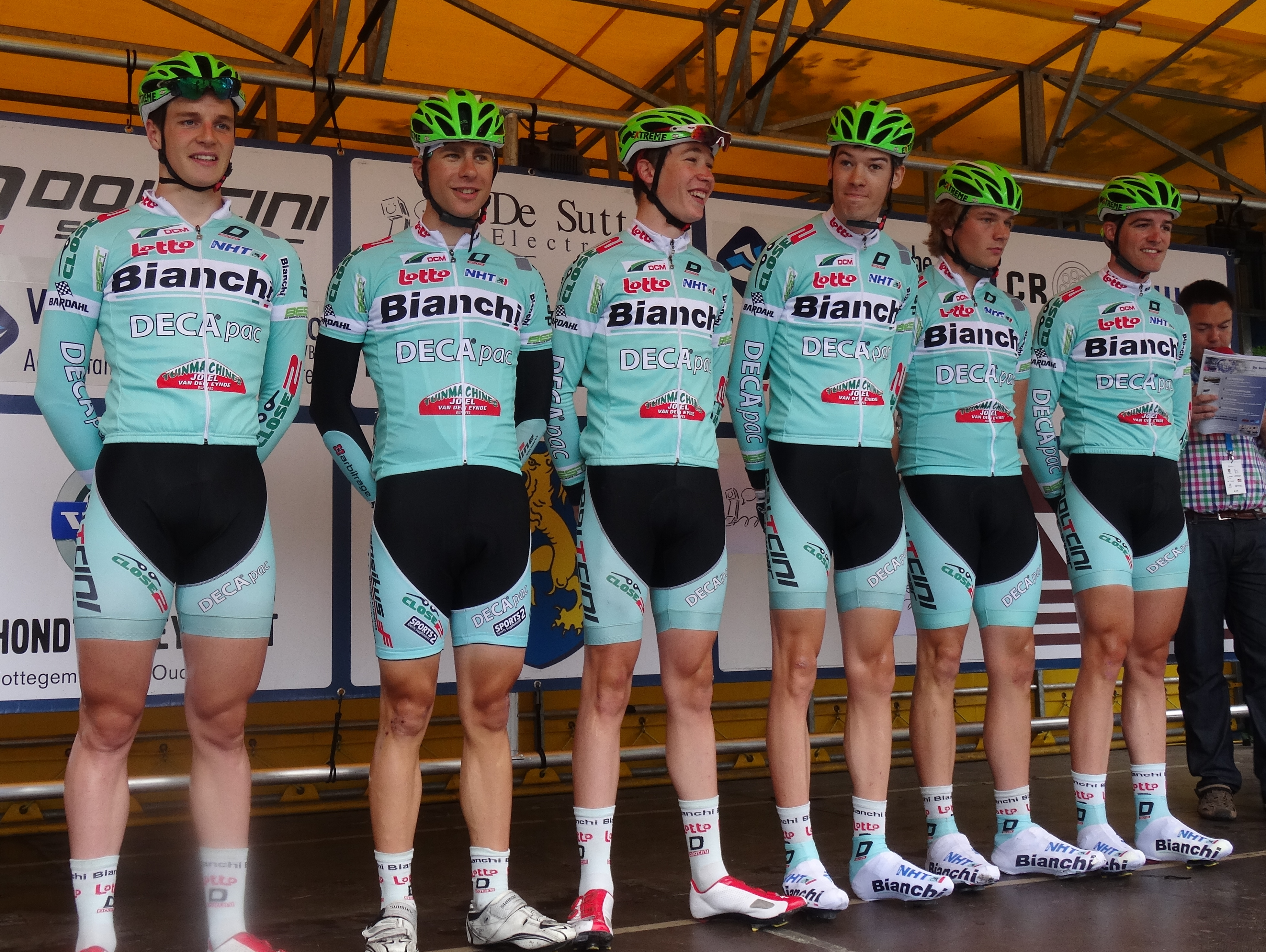 Reportage photographique réalisé le samedi 5 juillet à l'occasion du départ et de l'arrivée du Circuit Het Nieuwsblad espoirs 2014 à Grotenberge (Zottegem), Belgique.